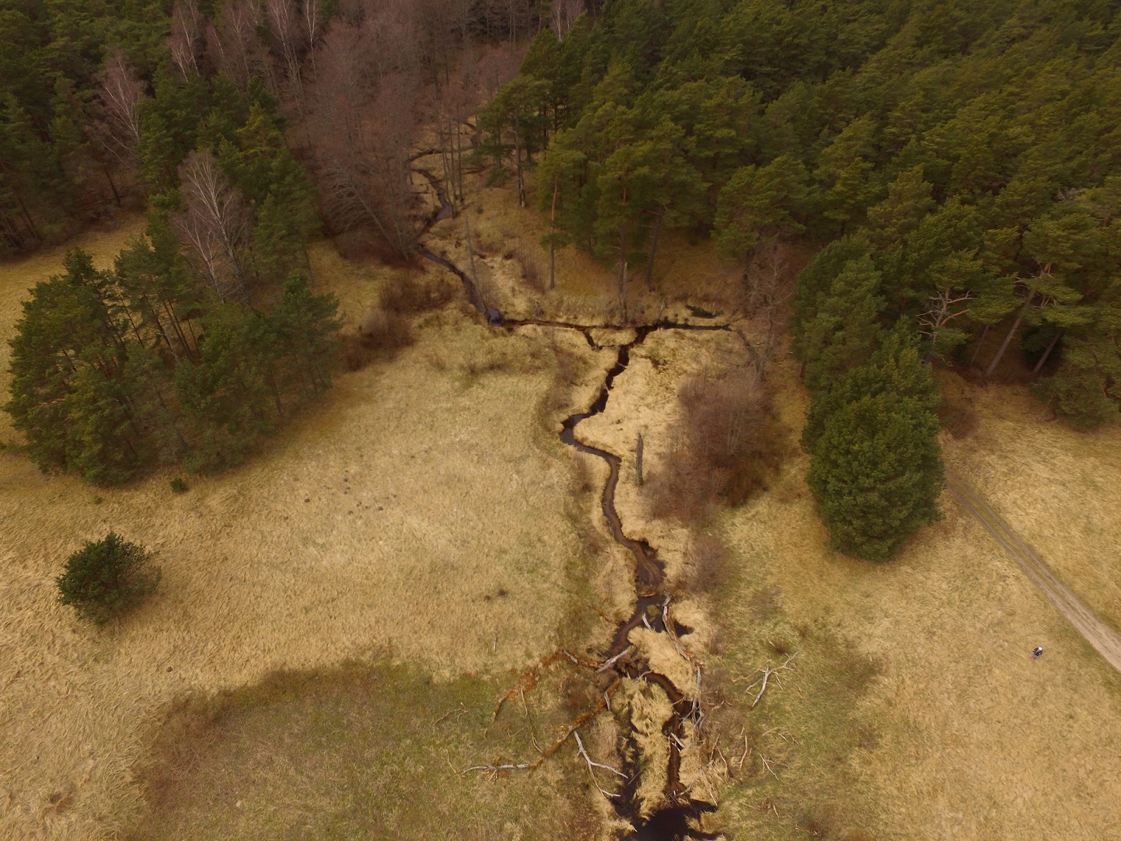 Лошупе